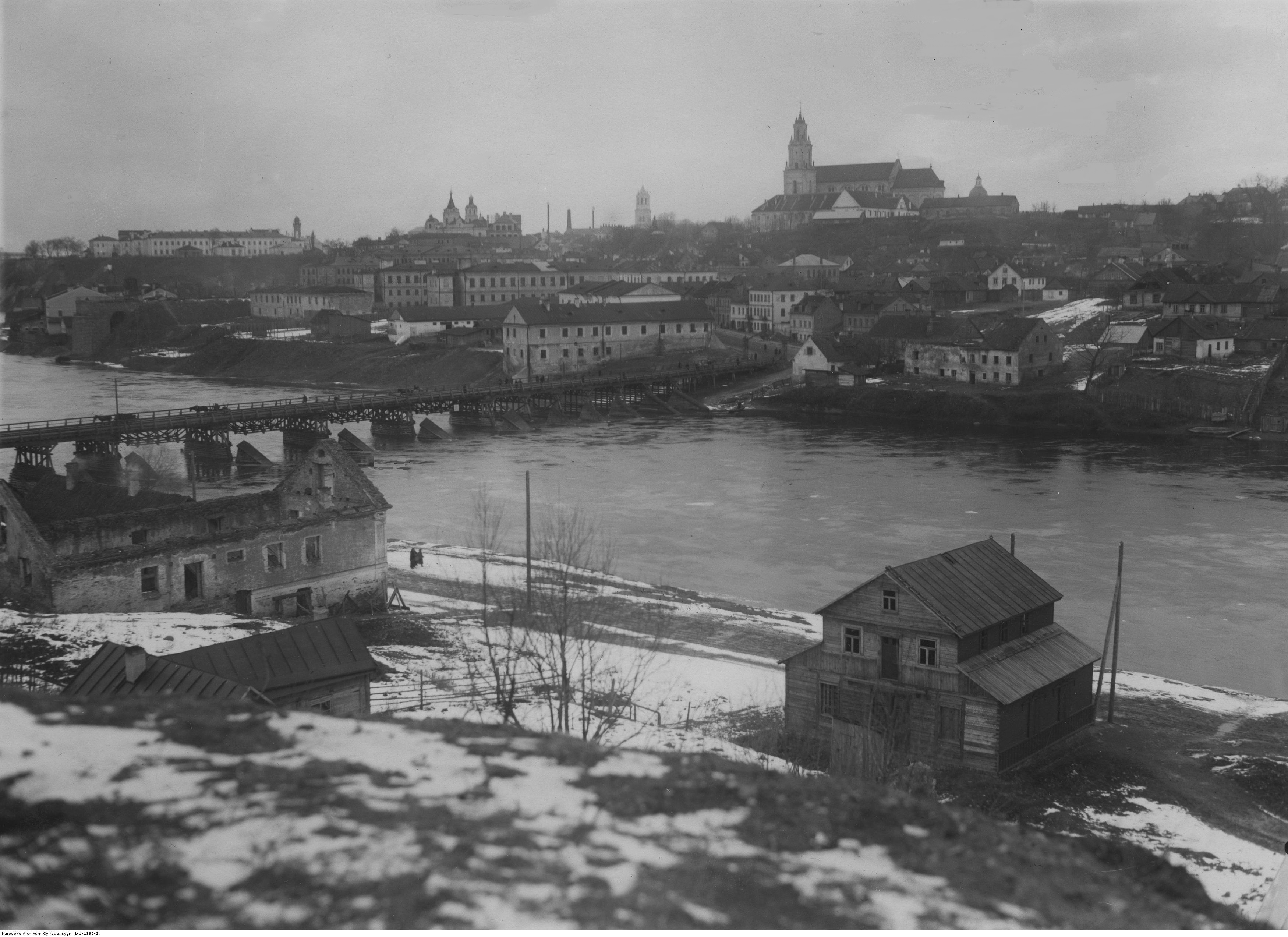 Grodno. Panorama miasta z dzielnicy Łosośna. Widok ogólny miasta i rzeki Niemen z mostem drewnianym. Koncern Ilustrowany Kurier Codzienny - Archiwum Ilustracji. Sygnatura: 1-U-1395-2